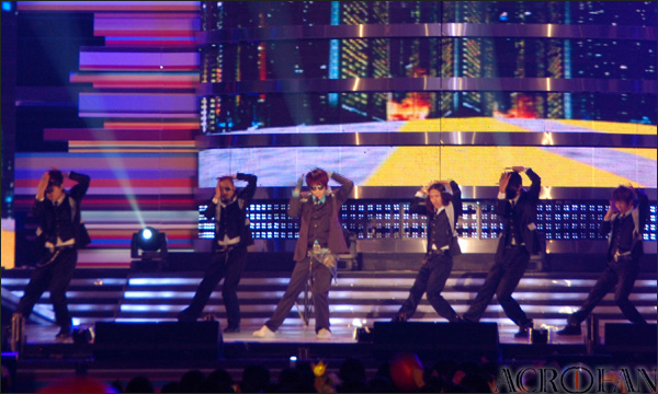 농심 협찬 제9회 '2008 사랑나눔콘서트'